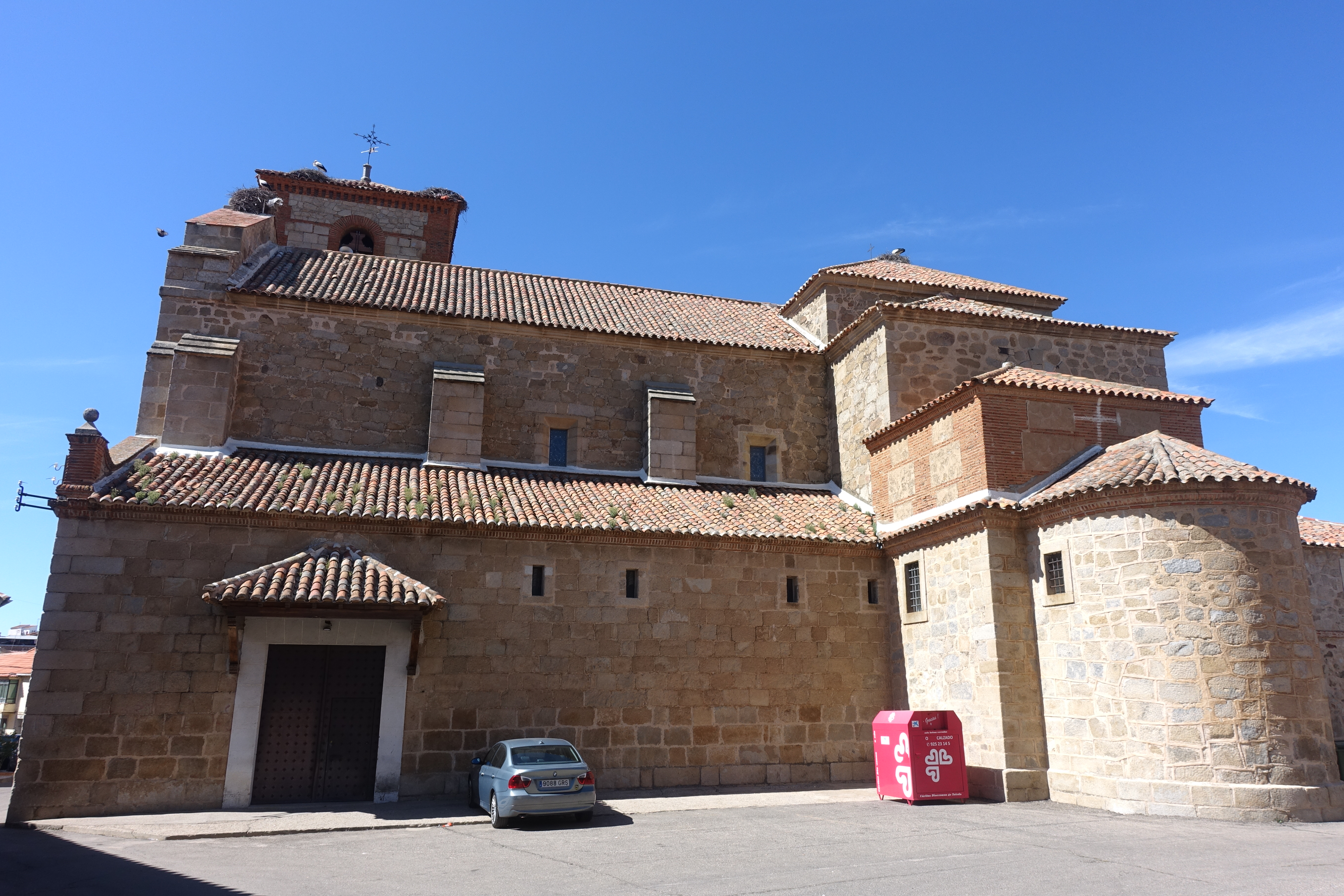 Iglesia de San Miguel Arcángel, en Navahermosa (Toledo, España).